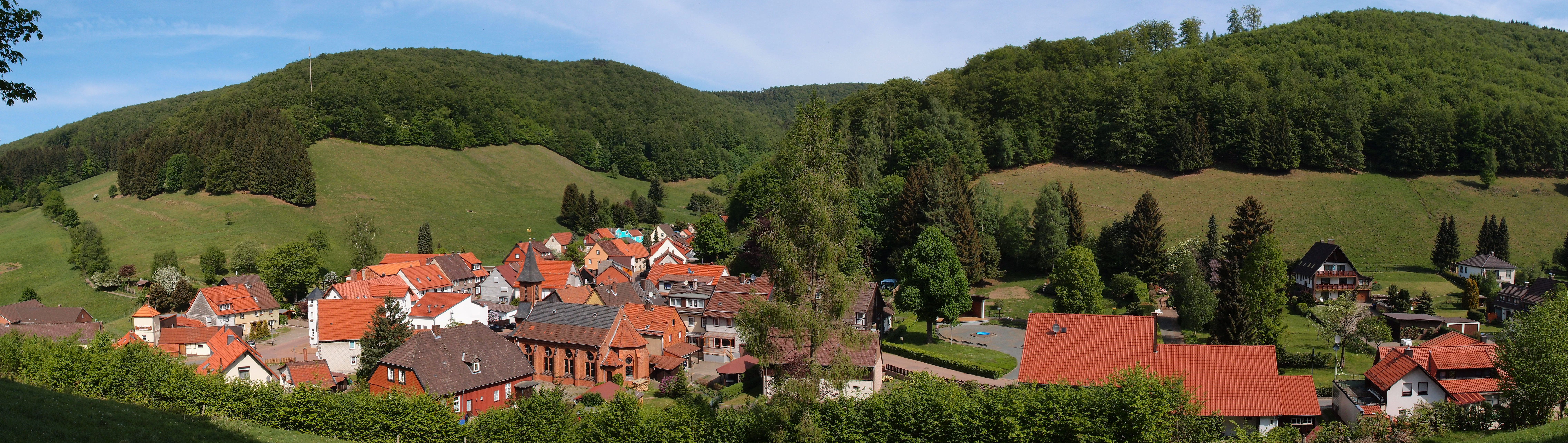 Südostpanorama von Lonau, einem Ortsteil von Herzberg am Harz. Im Hintergrund links der Braakberg und rechts der Große Mittelberg. Aufnahmestandort war die Nordseite des Hirtenkopfes.